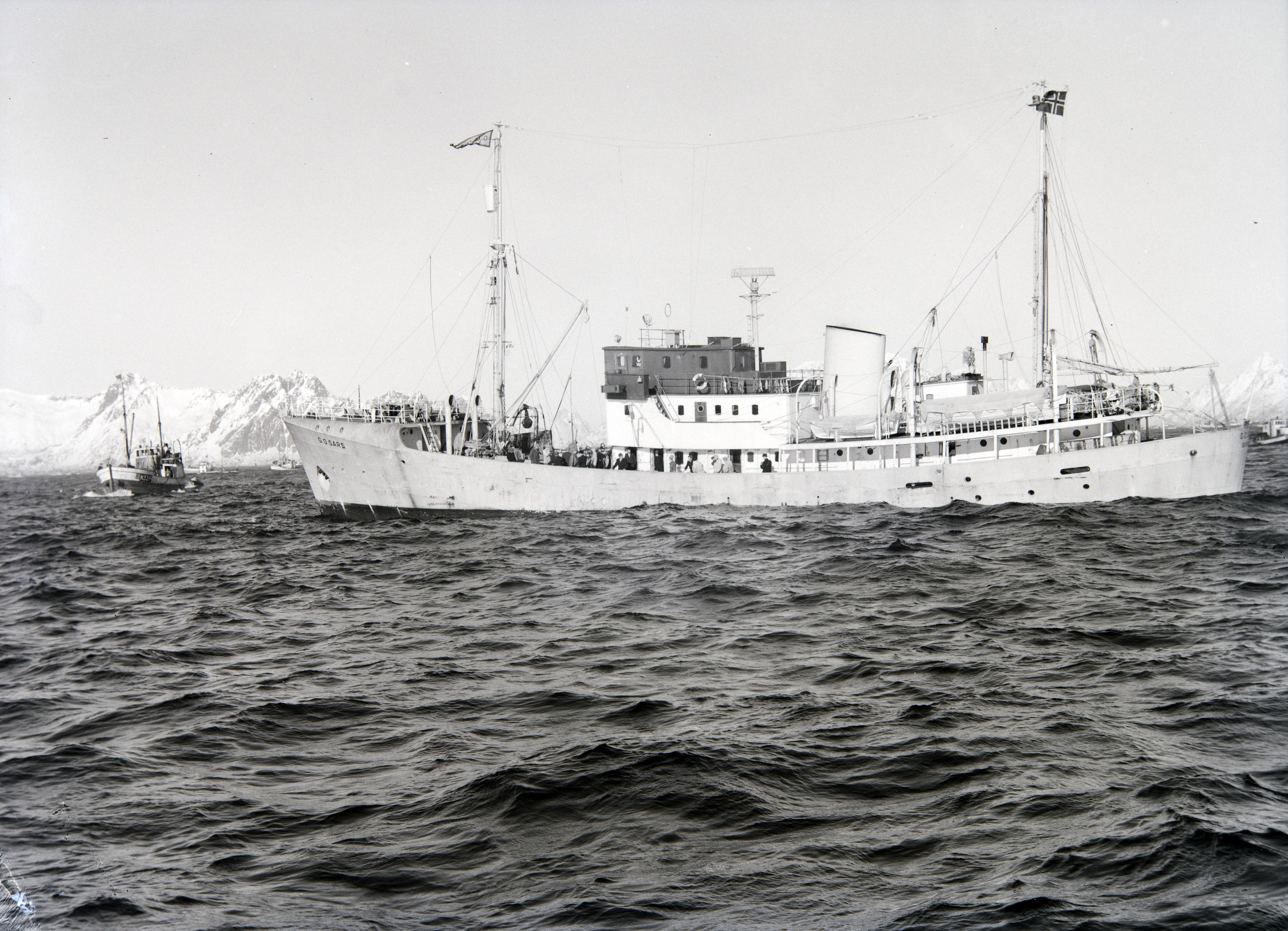 Bildet er hentet fra Nordlandsmuseet bildesamling etter Kanstad. Motivbeskrivelse: FF "G.O. Sars" Nøkkelord: Båter og fartøyer Motorskip Egennavn på dyr og ting